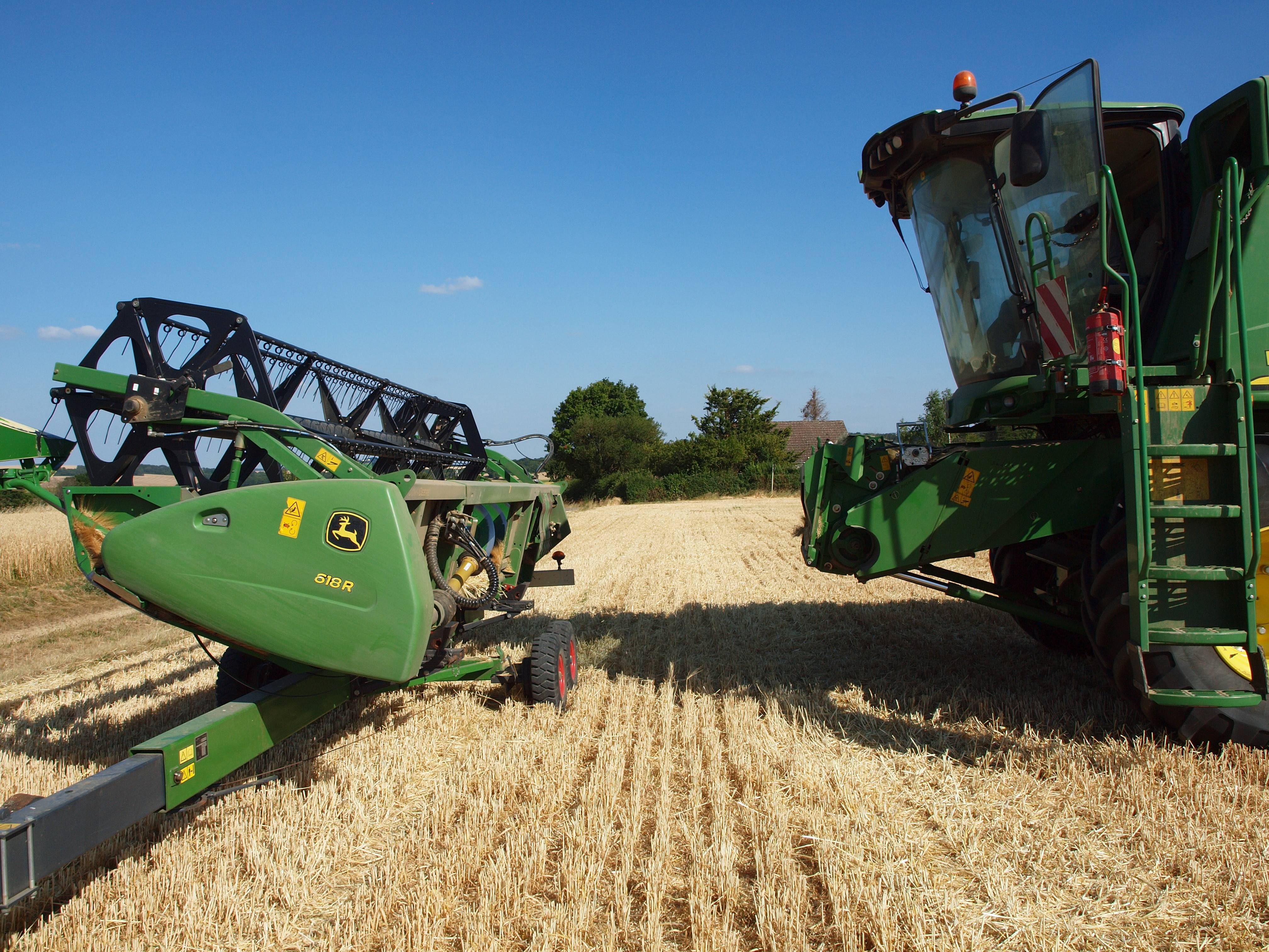 Thury (Yonne, France) ; dépose de la barre de coupe d'une moissonneuse-batteuse sur la chariot idoine (moisson des orges 2019)